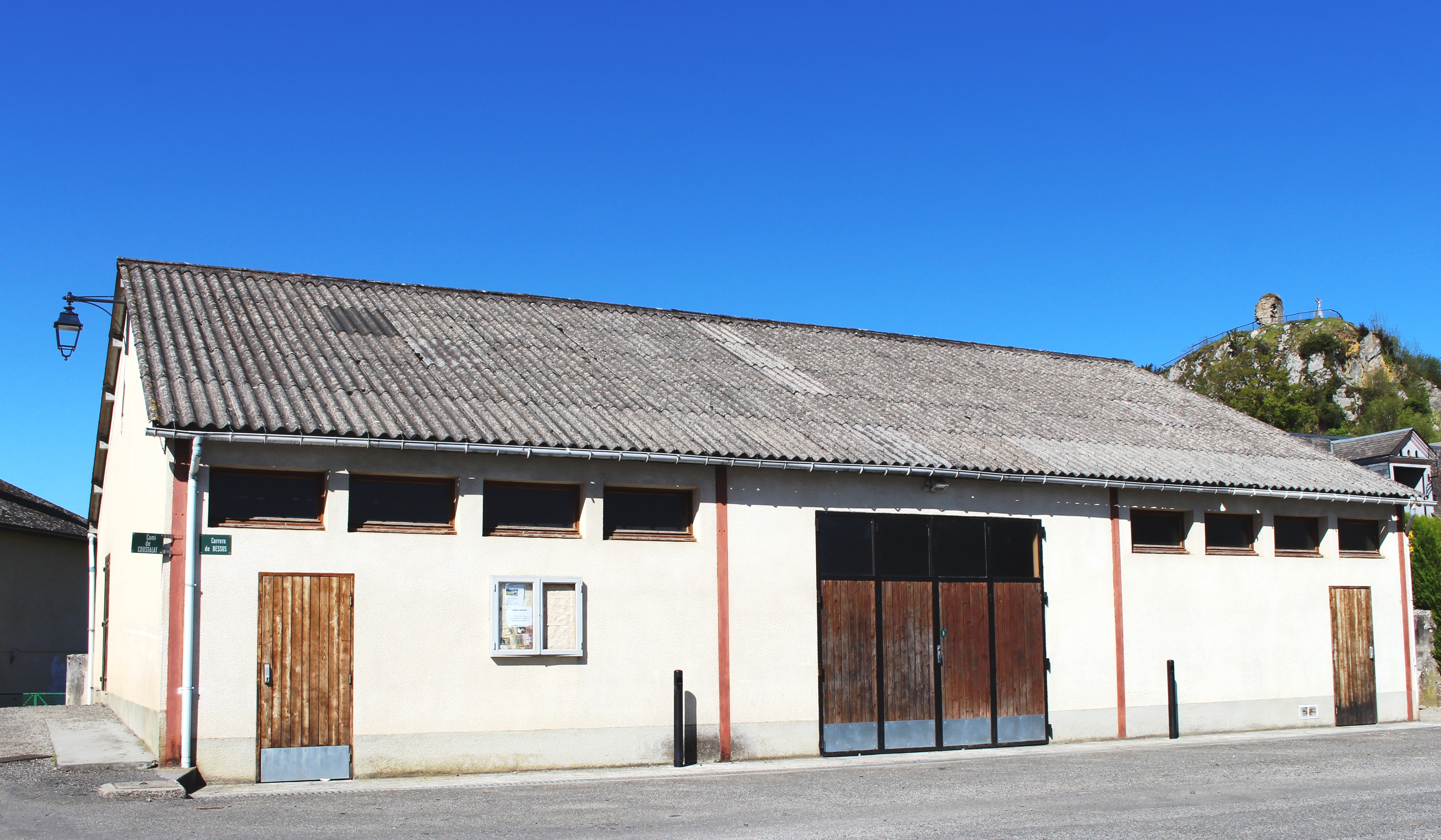 Salle des fêtes de Labassère (Hautes-Pyrénées)